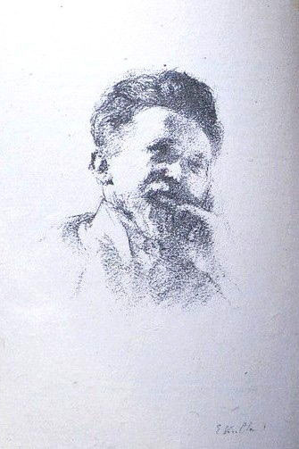 Frontispice de "Connaissance de la déesse" portrait de Lucien Fabre par Édouard Vuillard (1920)